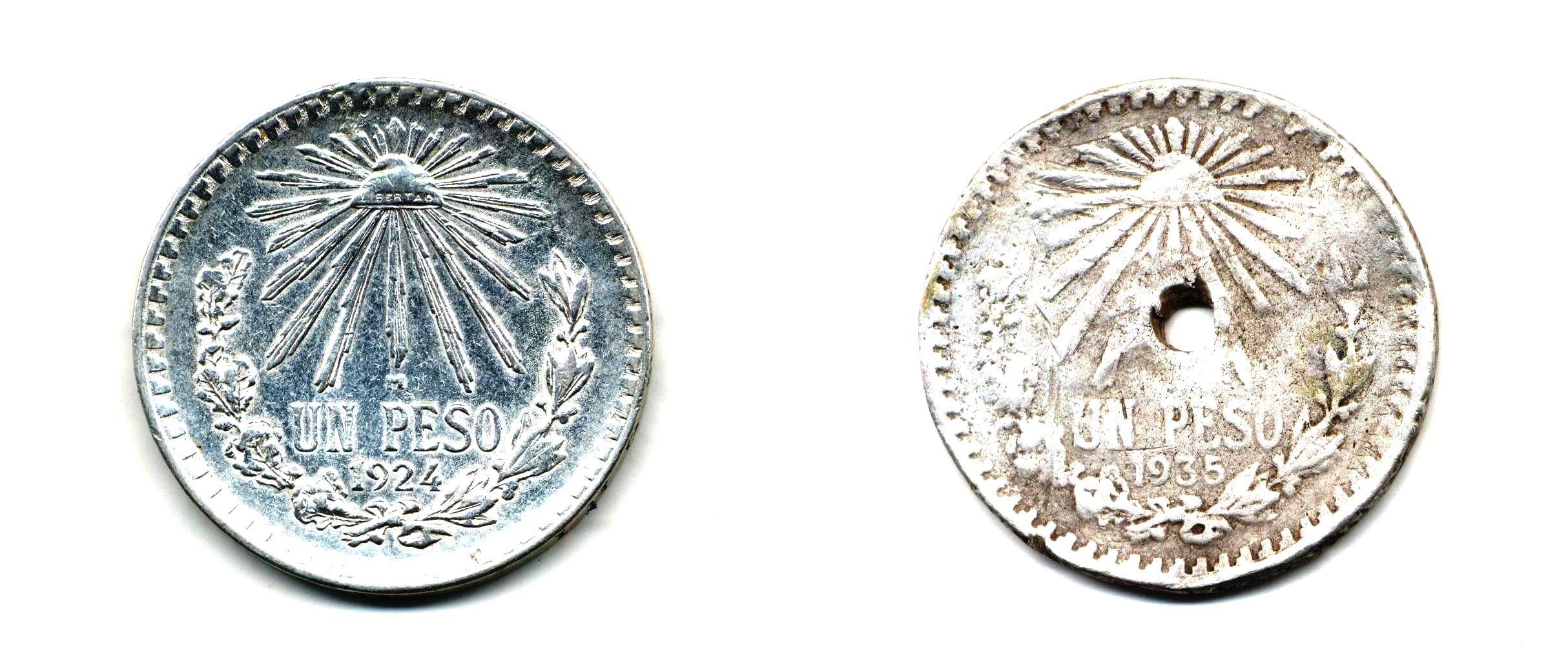 Monedas de 1 peso de México de 1924 (plata) y 1935 (falso).